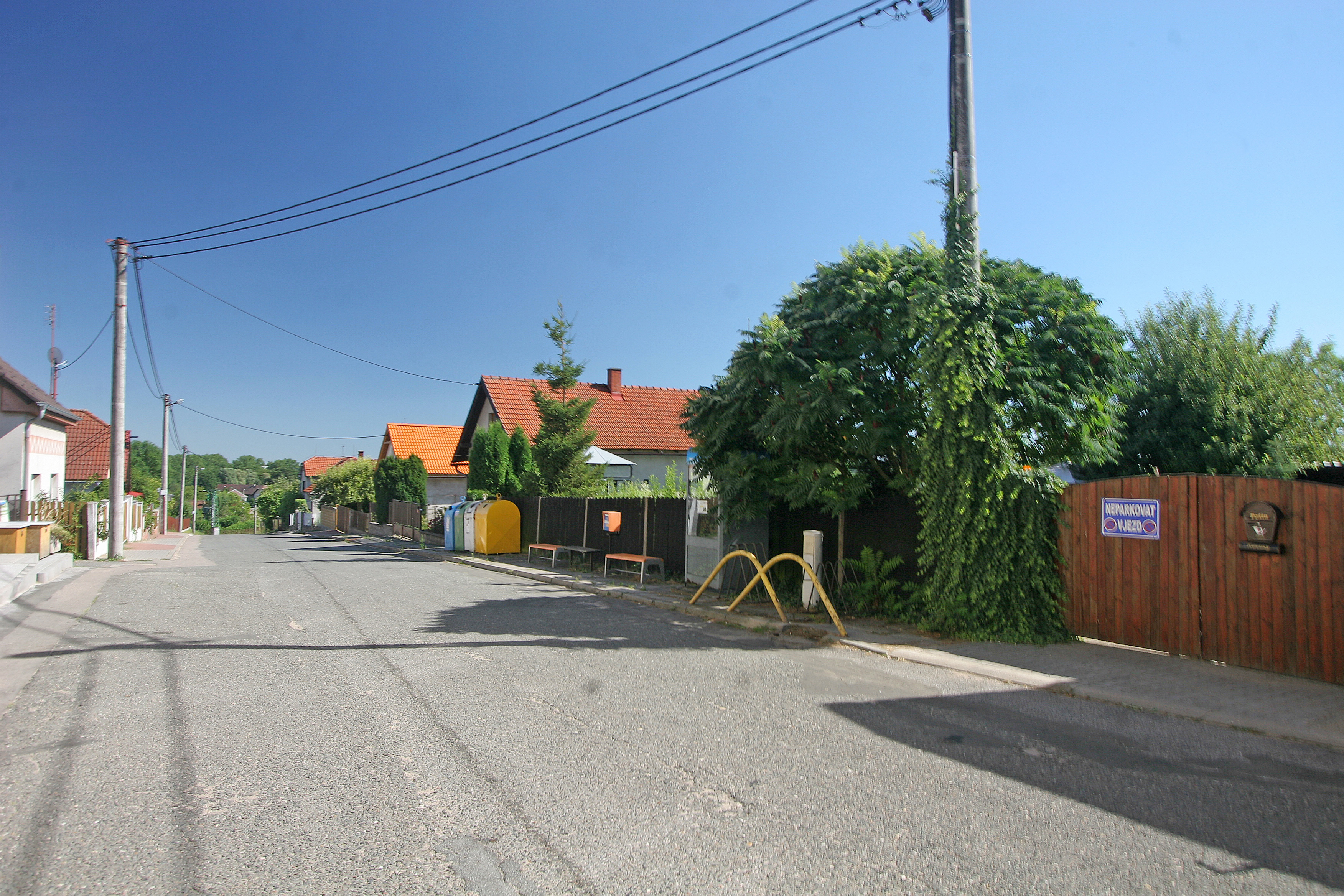 Olešnice čp. 58